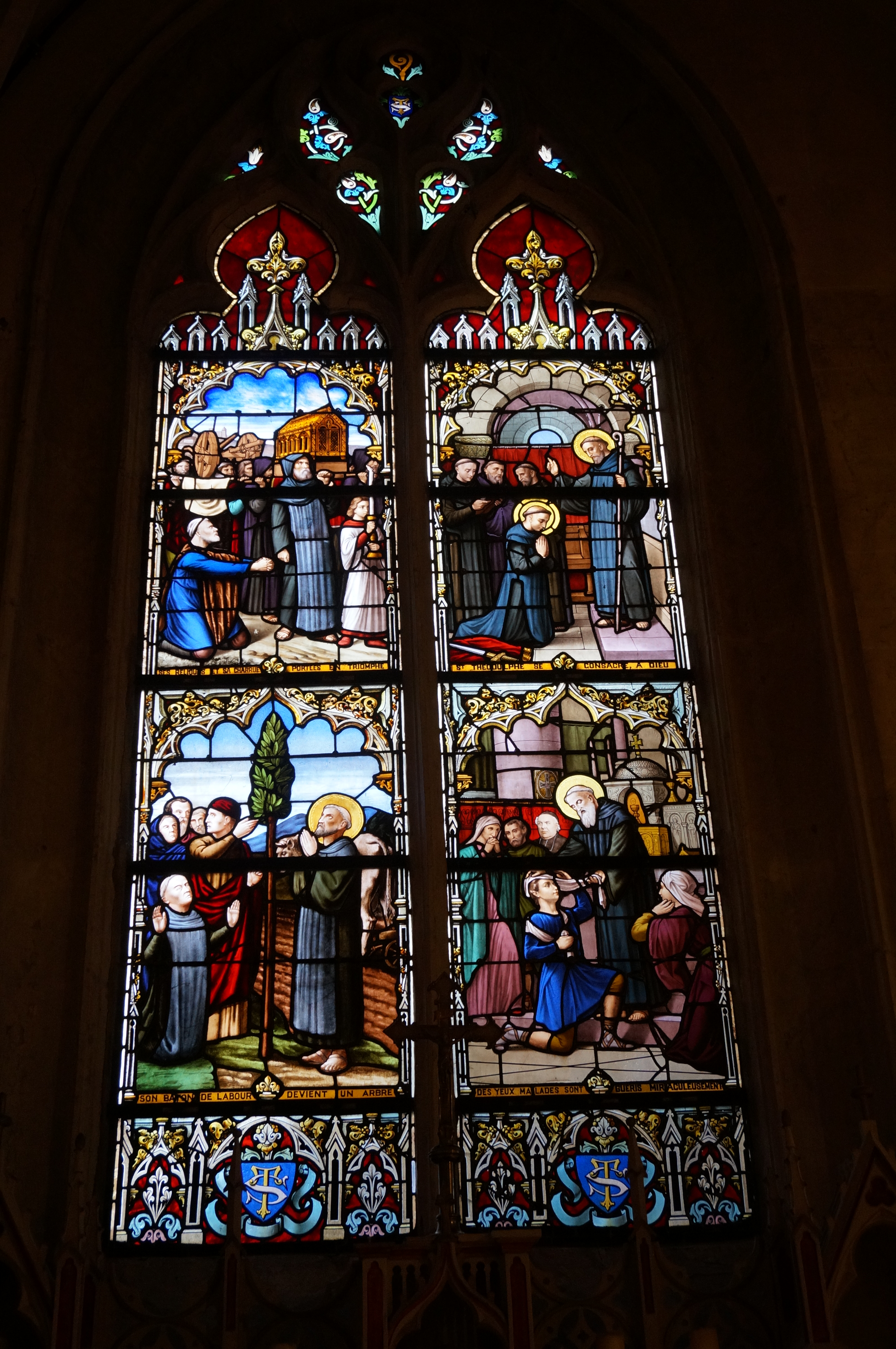 à Trigny.